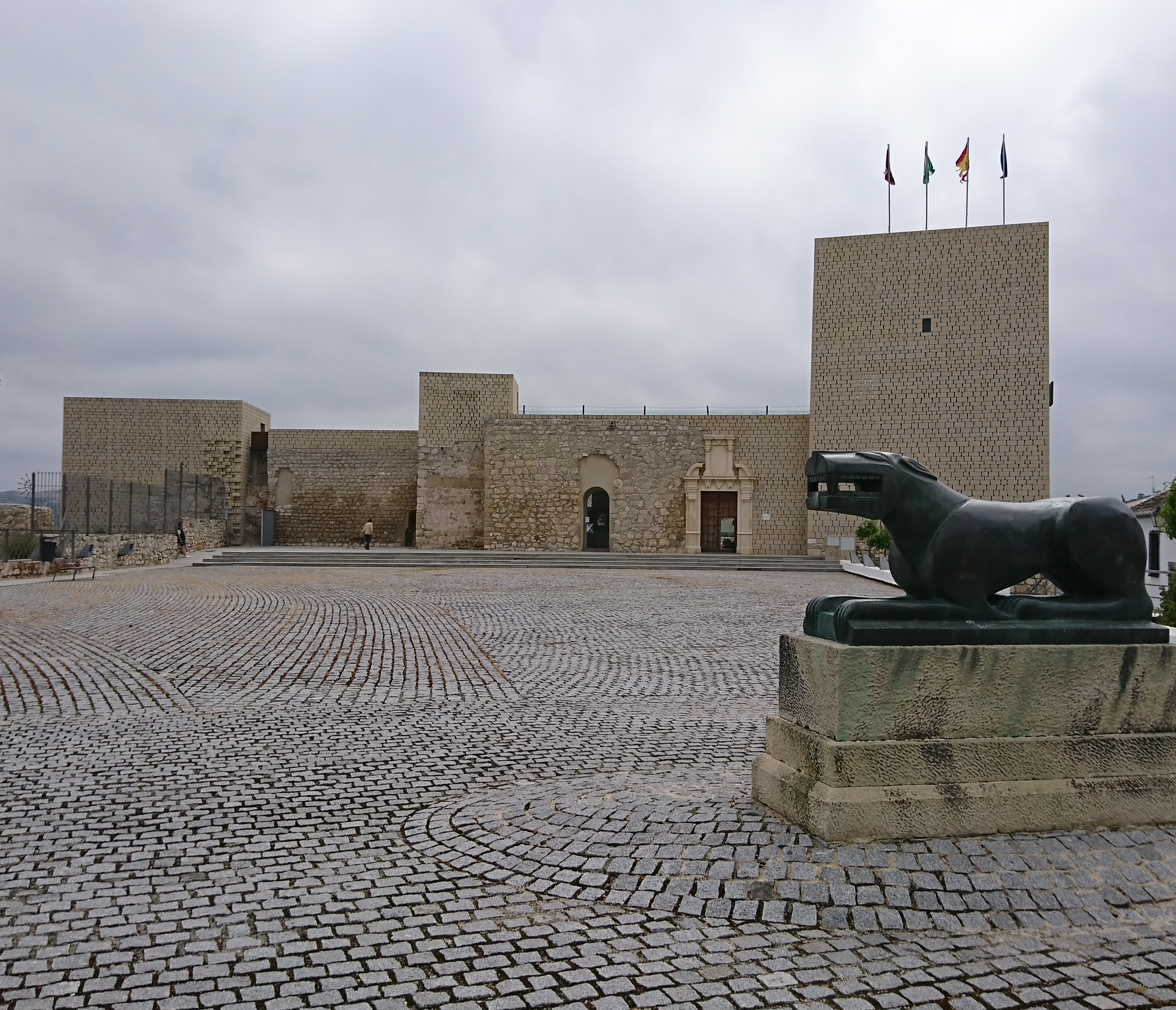 Castillo de Baena 2